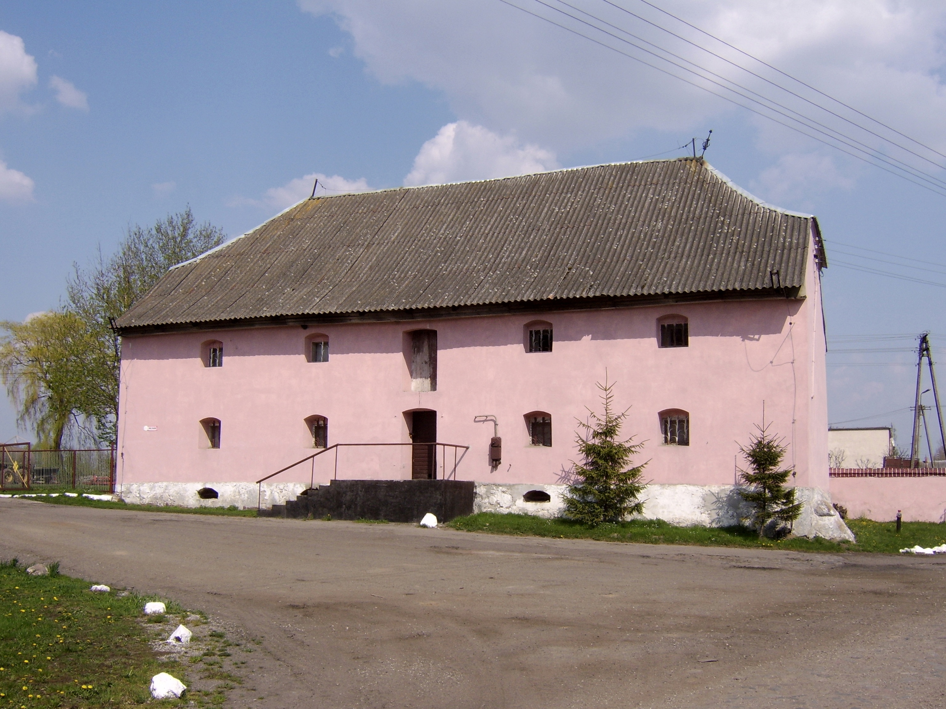 Płutowo - spichrz folwarczny, 1 poł. XIX w.